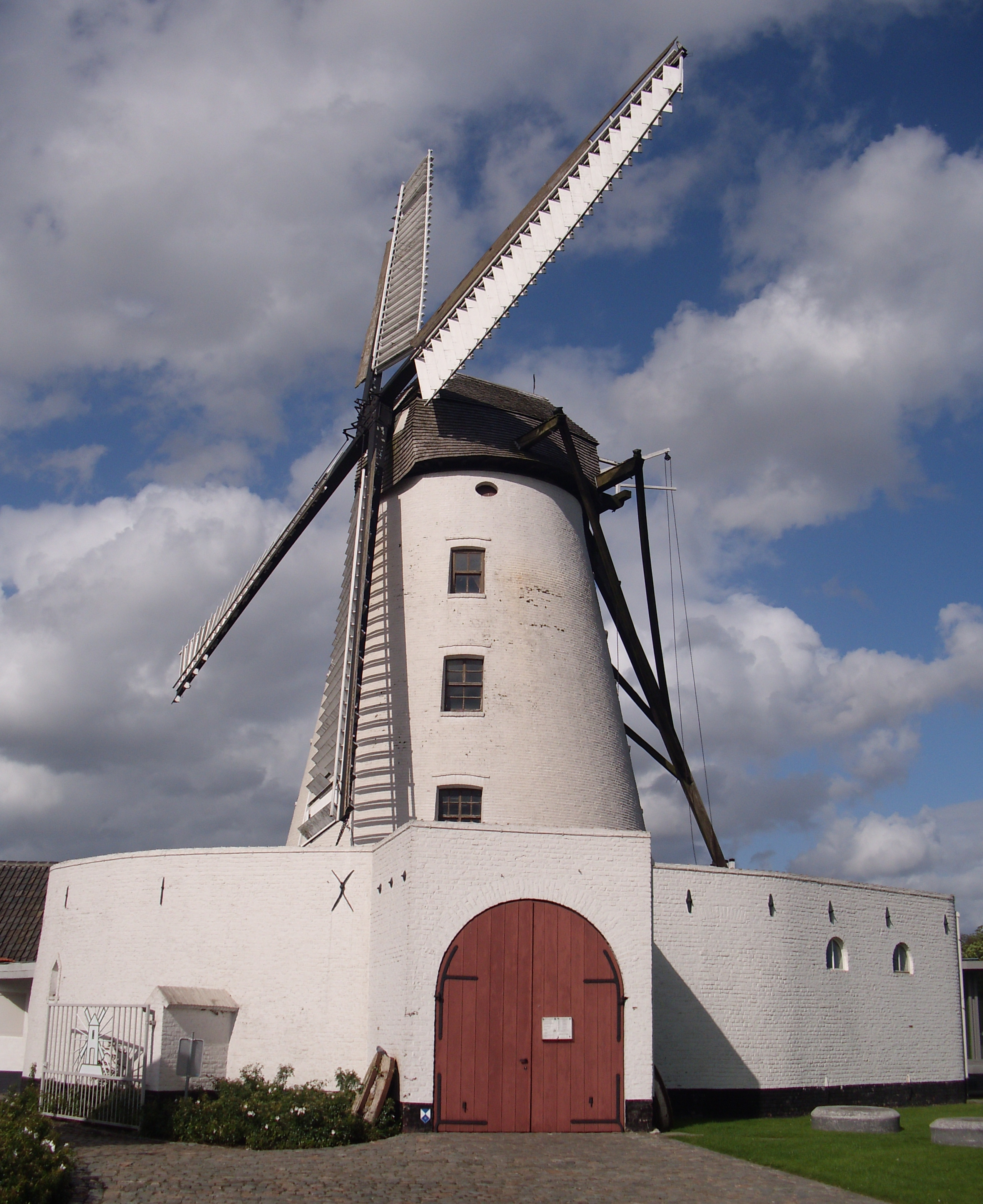 Molen in Marke (deelgemeente van Kortrijk, West-Vlaanderen).